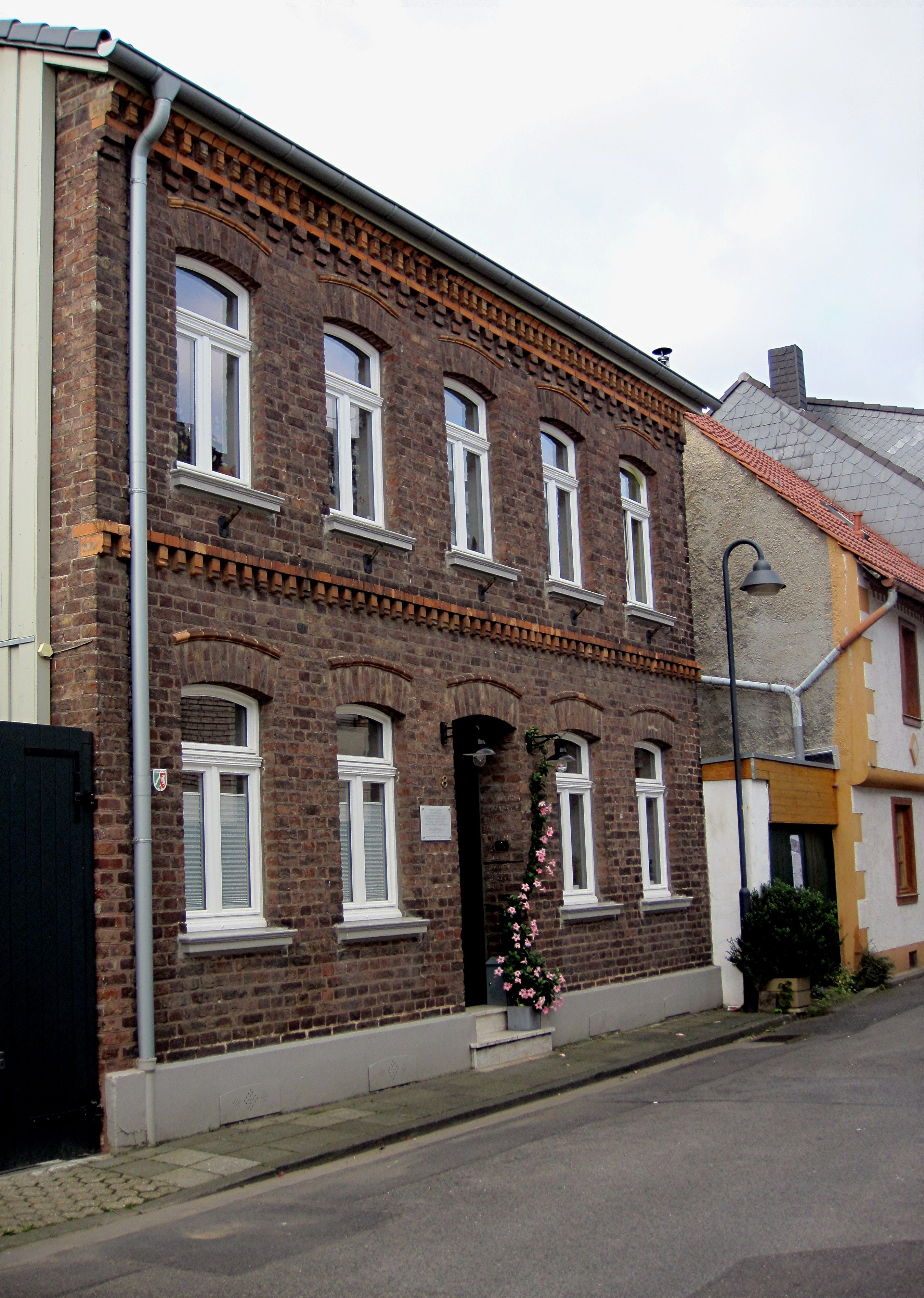 Wohnhaus von Jean Bungartz in Lechenich Zehntstraße 8 mit Gedenktafel. Sie verweist darauf, dass der renommierte Tiermaler und Gründer des Deutschen Vereins für Sanitätshunde von 1886 bis 1903 hier wohnte.